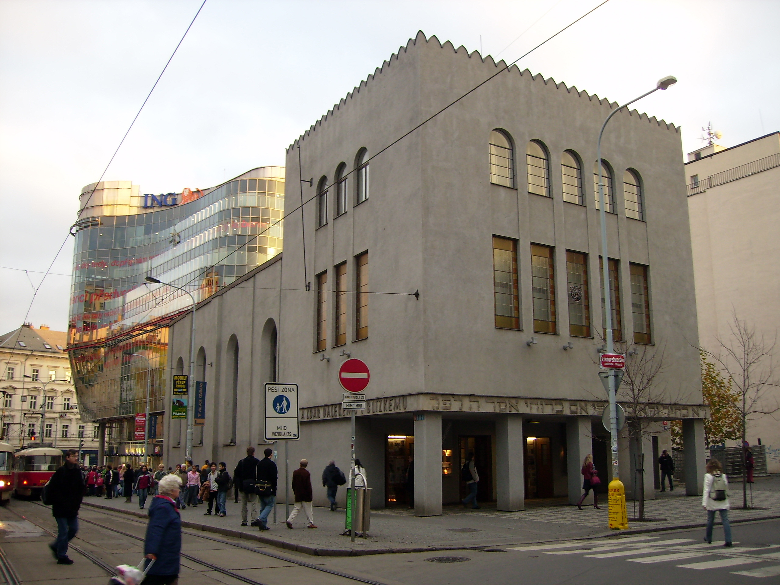 Smichovska synagoga od nakupniho centra.